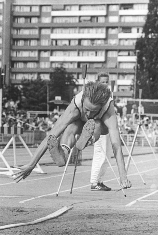 Helga Radtke ADN-ZB Koard 21.7.89 Neubrandenburg: 40. DDR-Leichtathletik-Meisterschaften. Mit guten 6,99 m wurde die Rostockerin Helga Radtke Meisterin im Weitsprung.